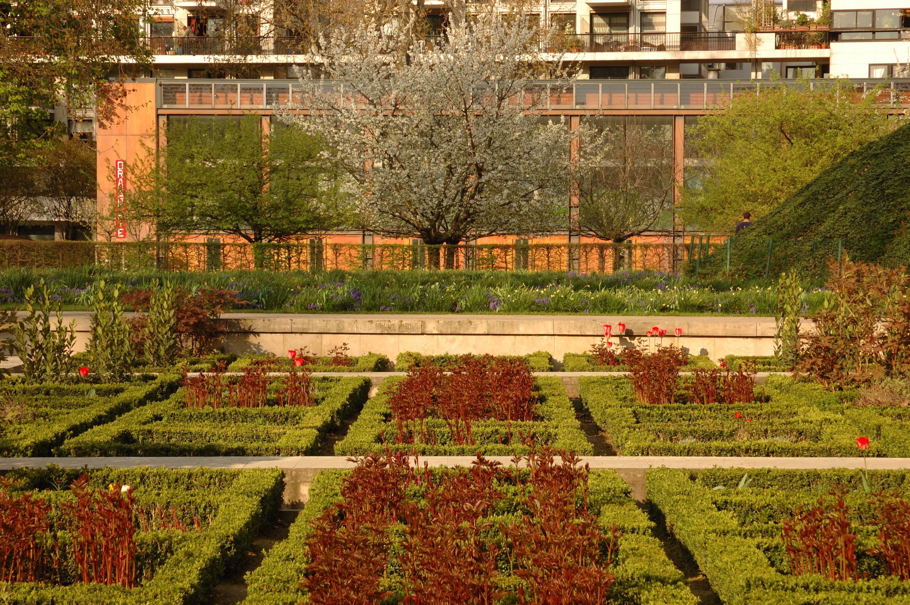 Vue latérale des "Parterres" du Parc de Bercy (Paris 12)